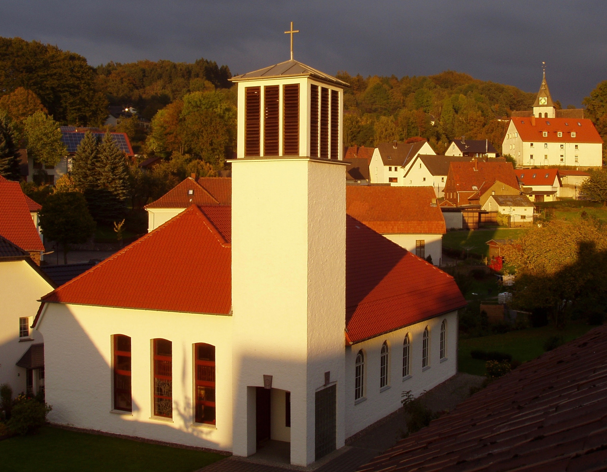 Kirche der evangelisch-lutherischen St. Michaelis Gemeinde der SELK in Talle